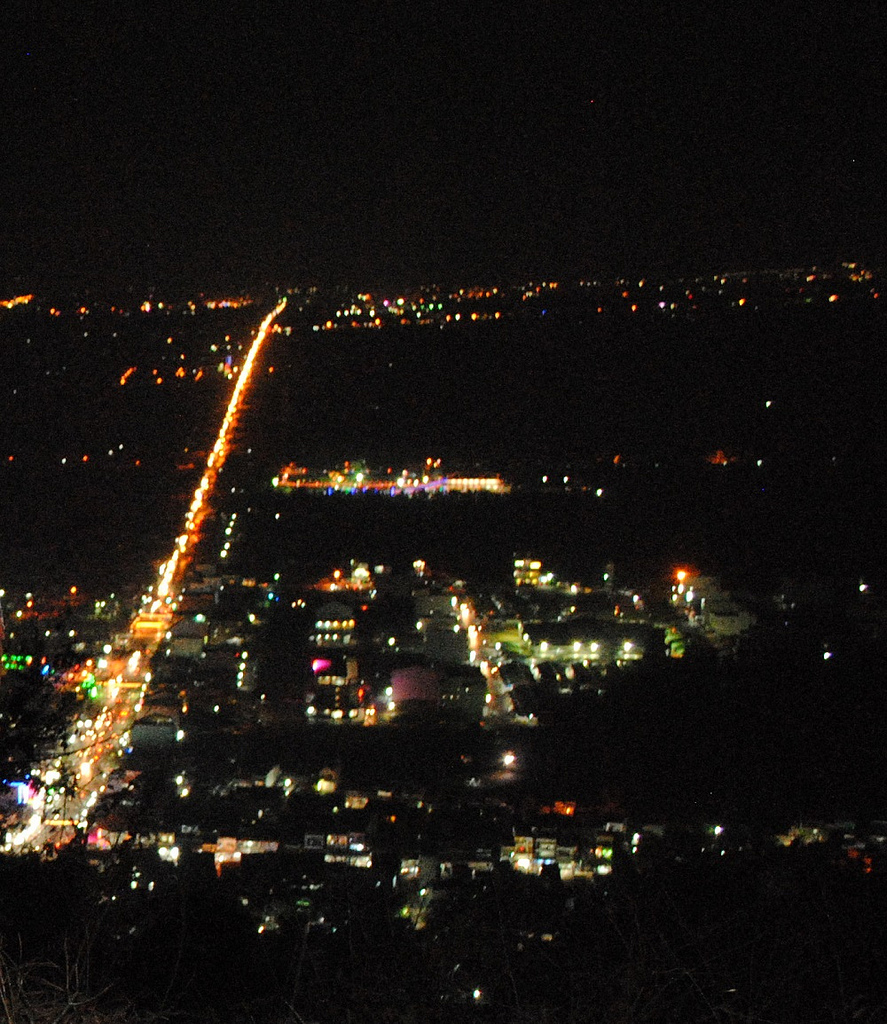 Hình ảnh Châu Đốc nhìn từ Núi Sam.